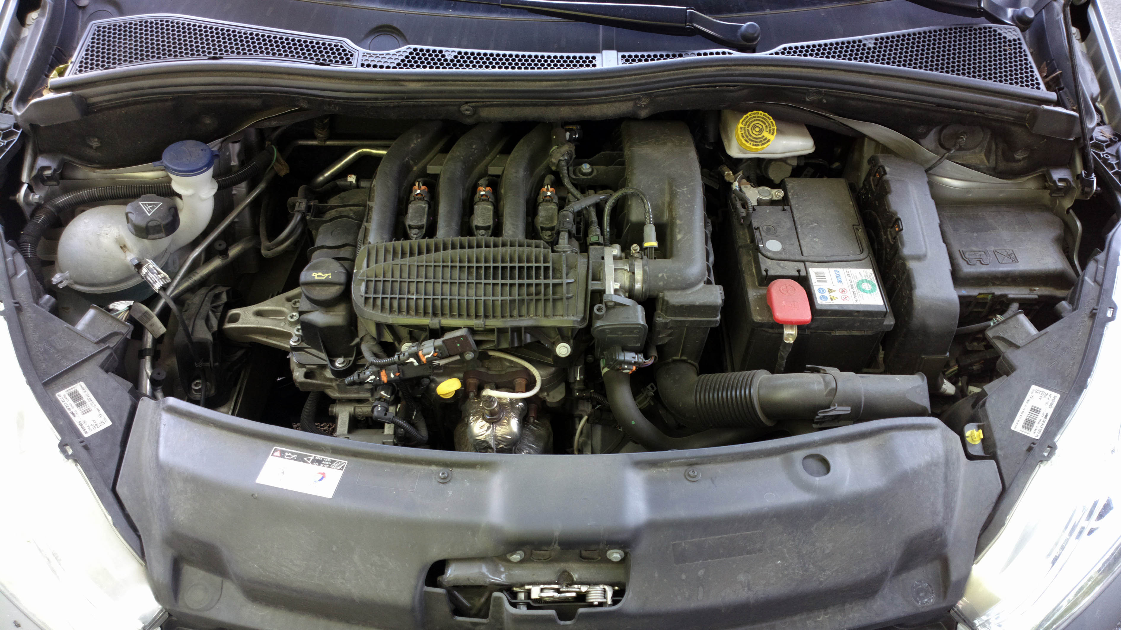 Moteur PSA EB 1.2 VTi 82 ch équipant une Peugeot 208